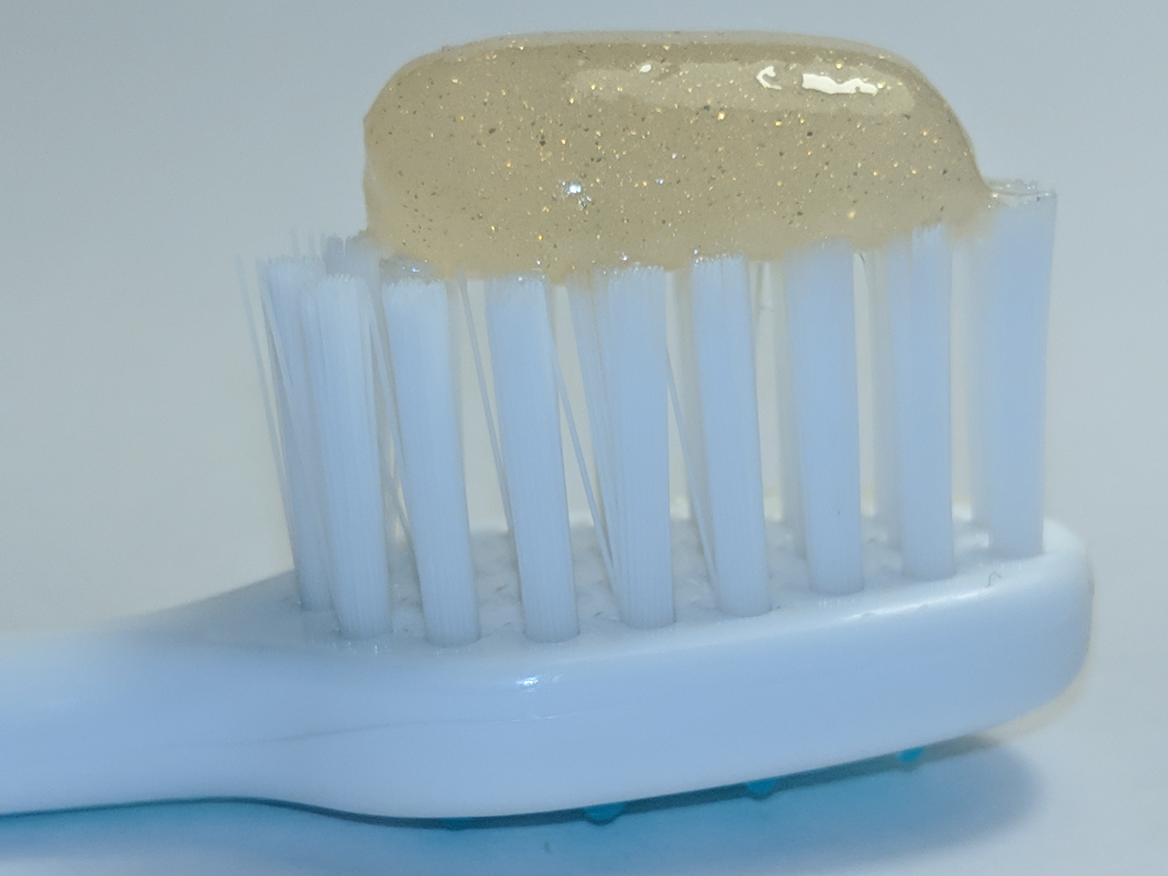 GoldZahnpasta